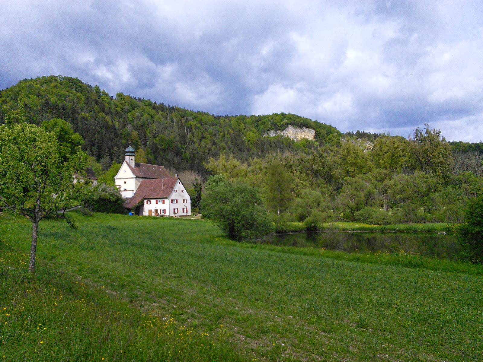 St. Gallus-Kirche, Altstadt, Mühlheim a.d.Donau, Baden-Württemberg, Germany.